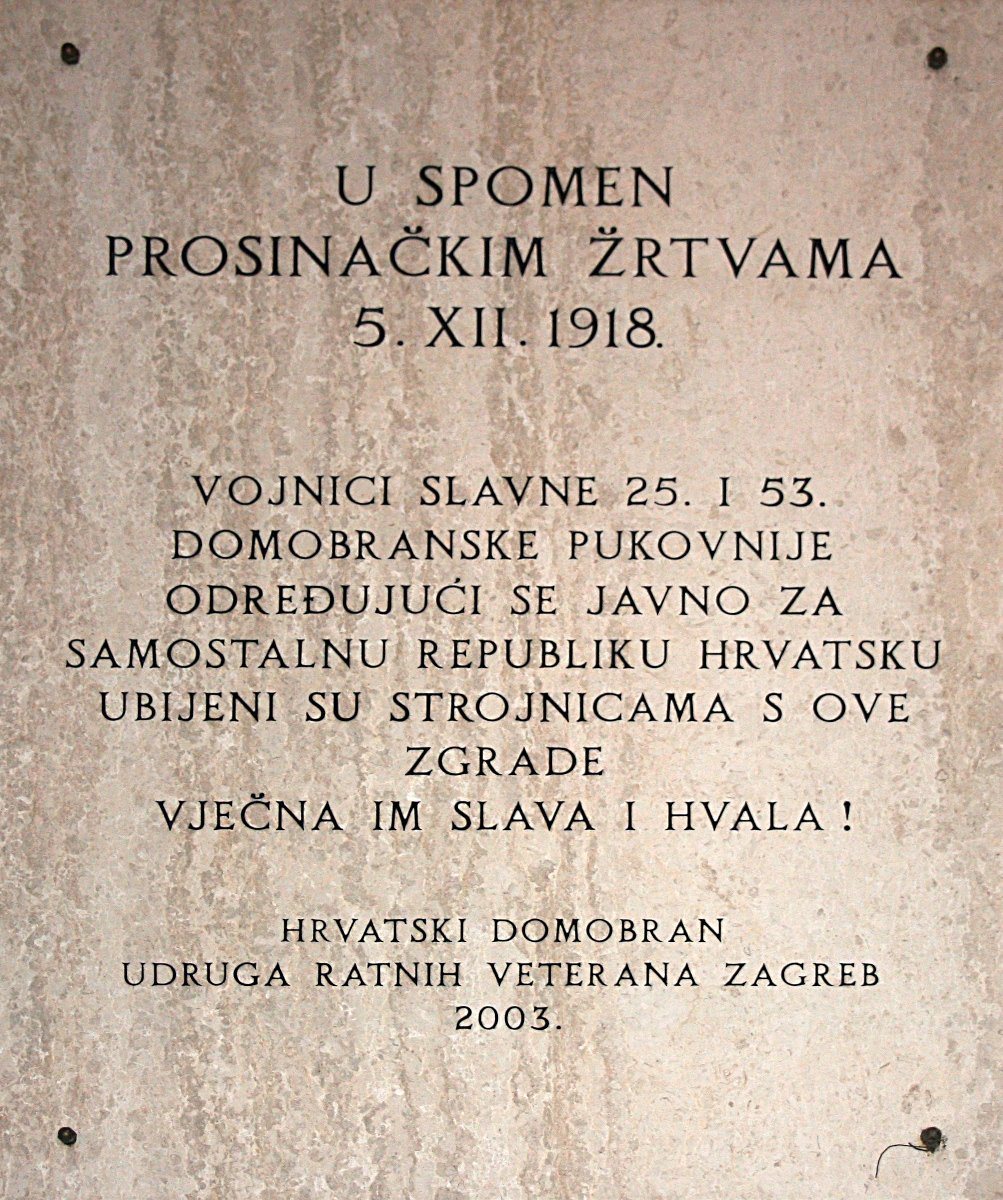 Spomen ploča Prosinačkim žrtvama na Trgu bana Jelačića